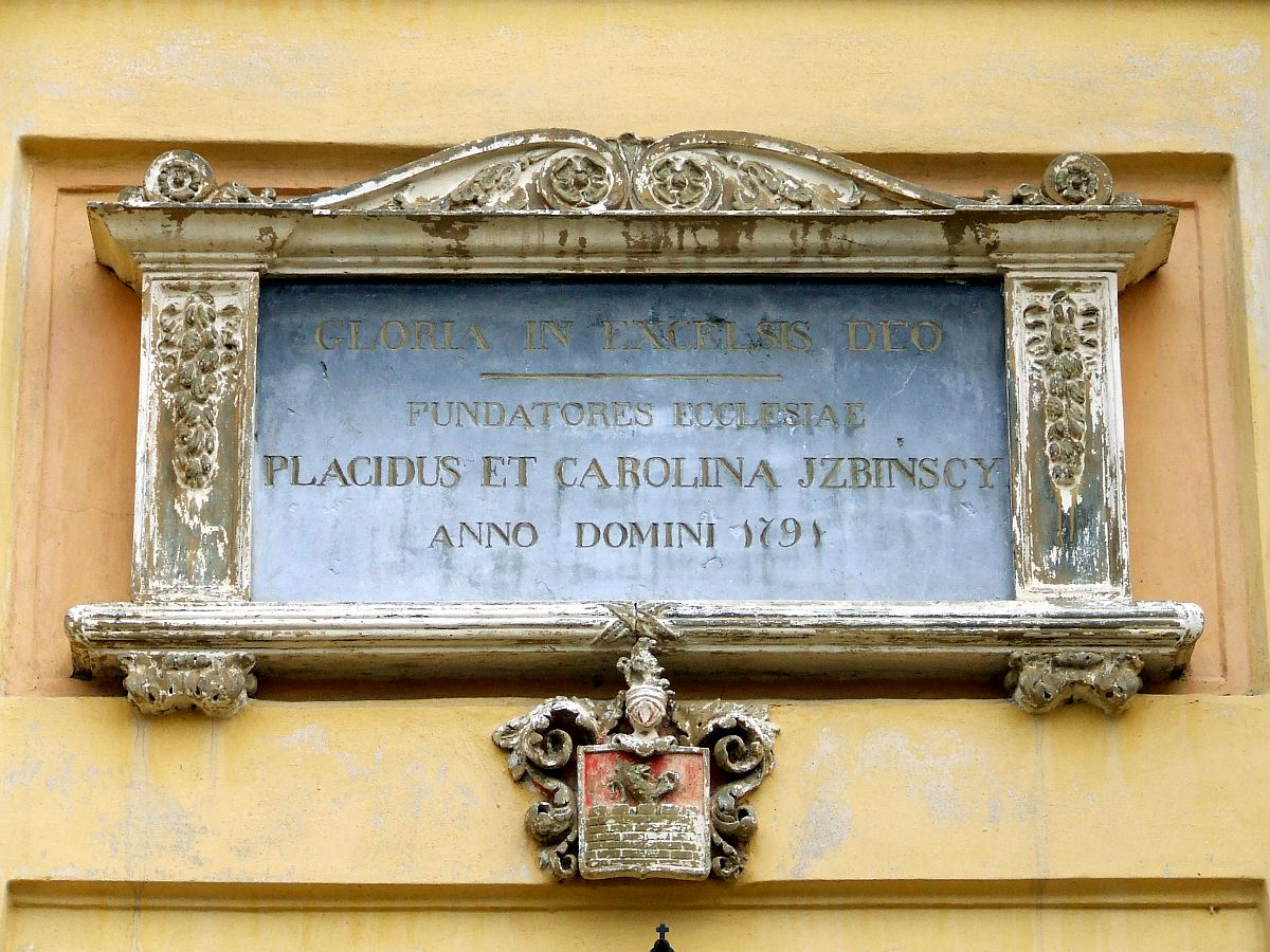 Zaborów (powiat warszawski zachodni), fundation board